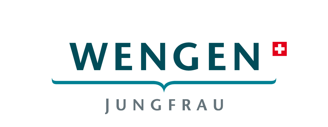 Logo von Wengen, Schweiz